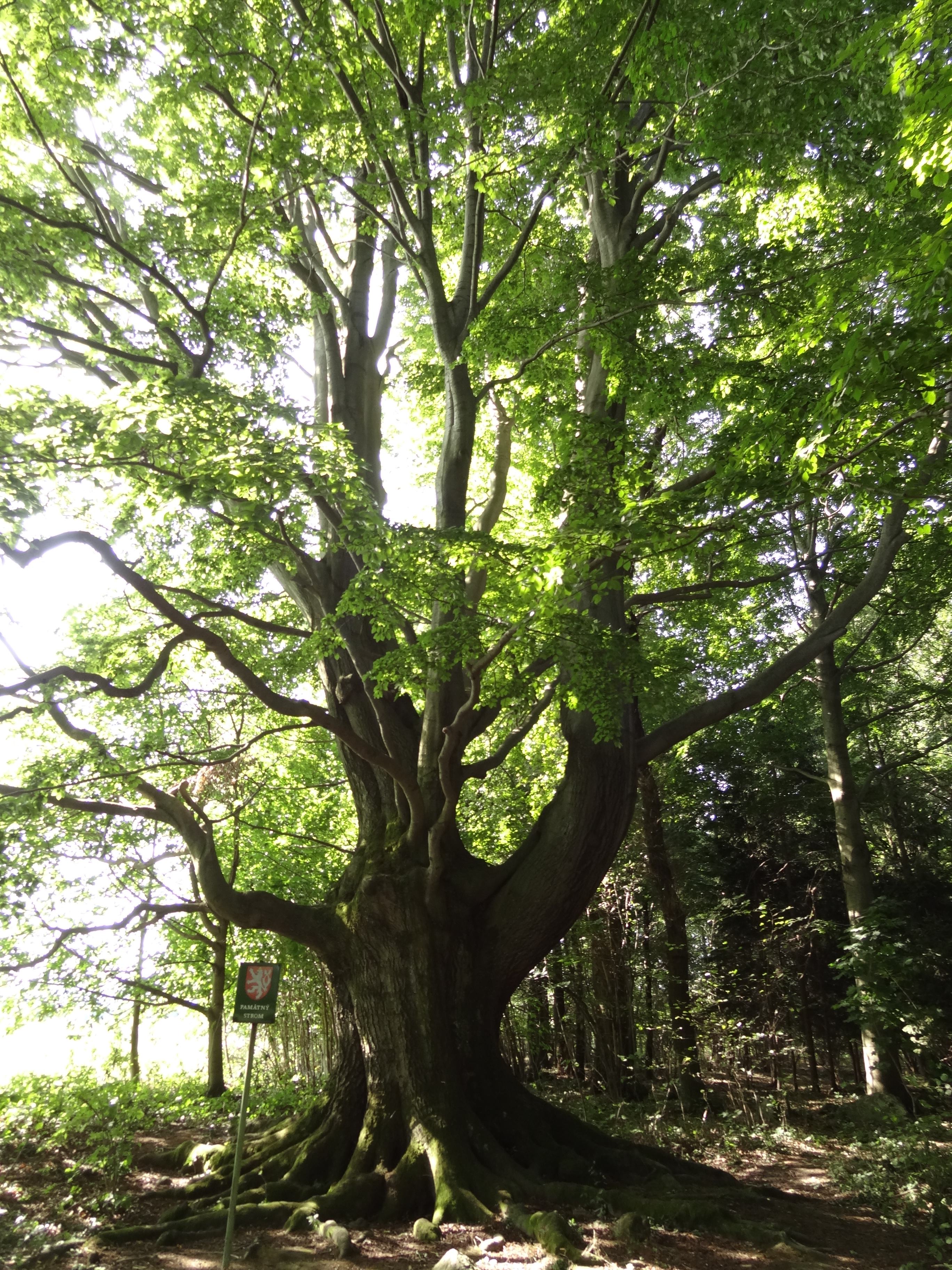 Hladový buk u Dětřichovce